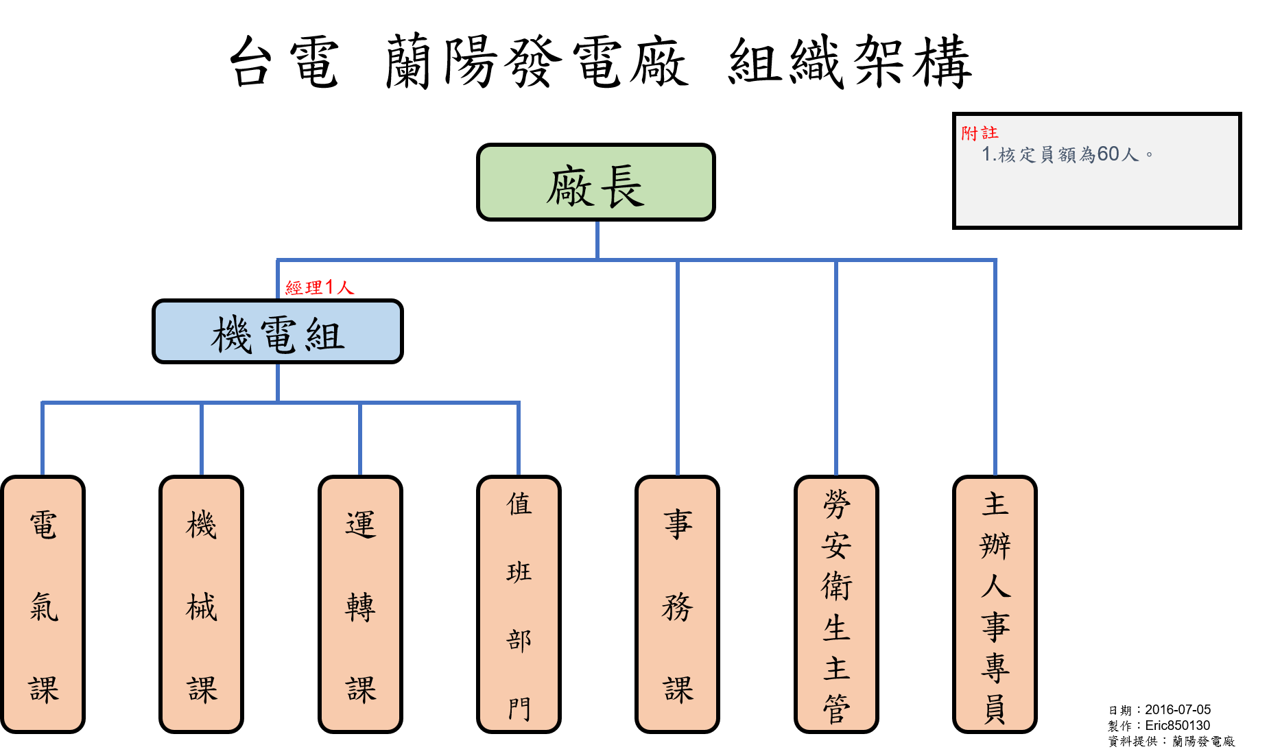 蘭陽發電廠組織架構